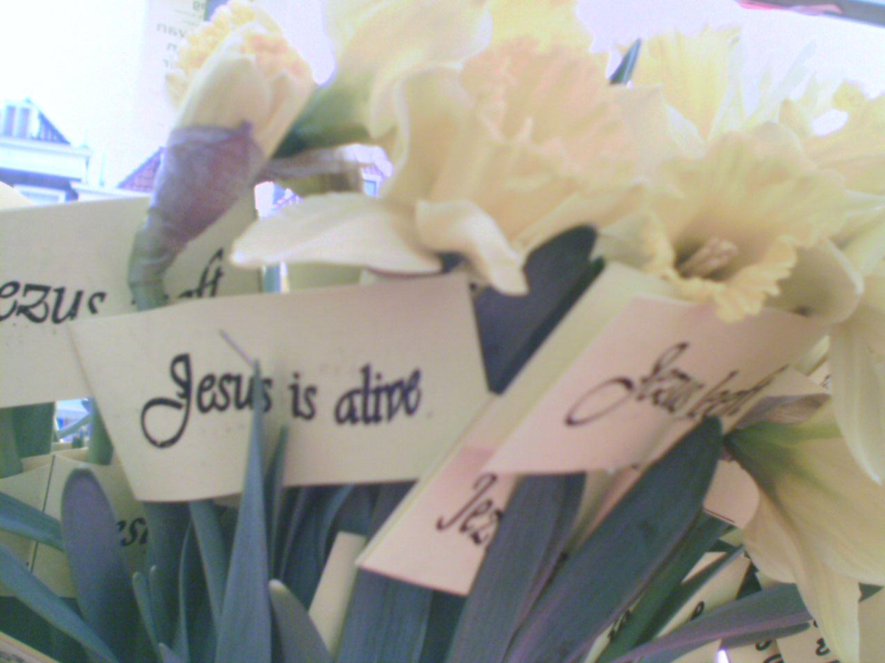 Zelfgemaakte foto van narcissen die tijdens de paasjubel in Delft werden uitgedeeld op 16 april 2006 (1ste paasdag)